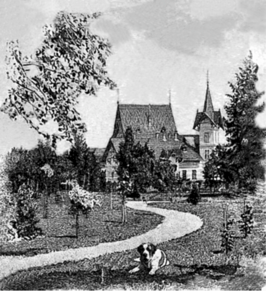 Schloss Berhometh um 1900, Schloss der Freiherren, später Grafen Wassilko von Serecki